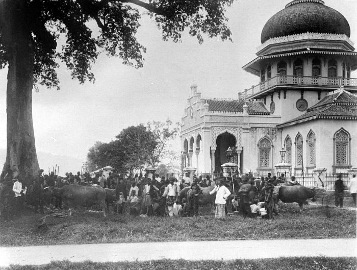 Repronegatief. Inzegening van karbouwen, die geslacht worden na afloop van de vastenmaand Ramadan, bij de Baiturrahman moskee in Koetaradja